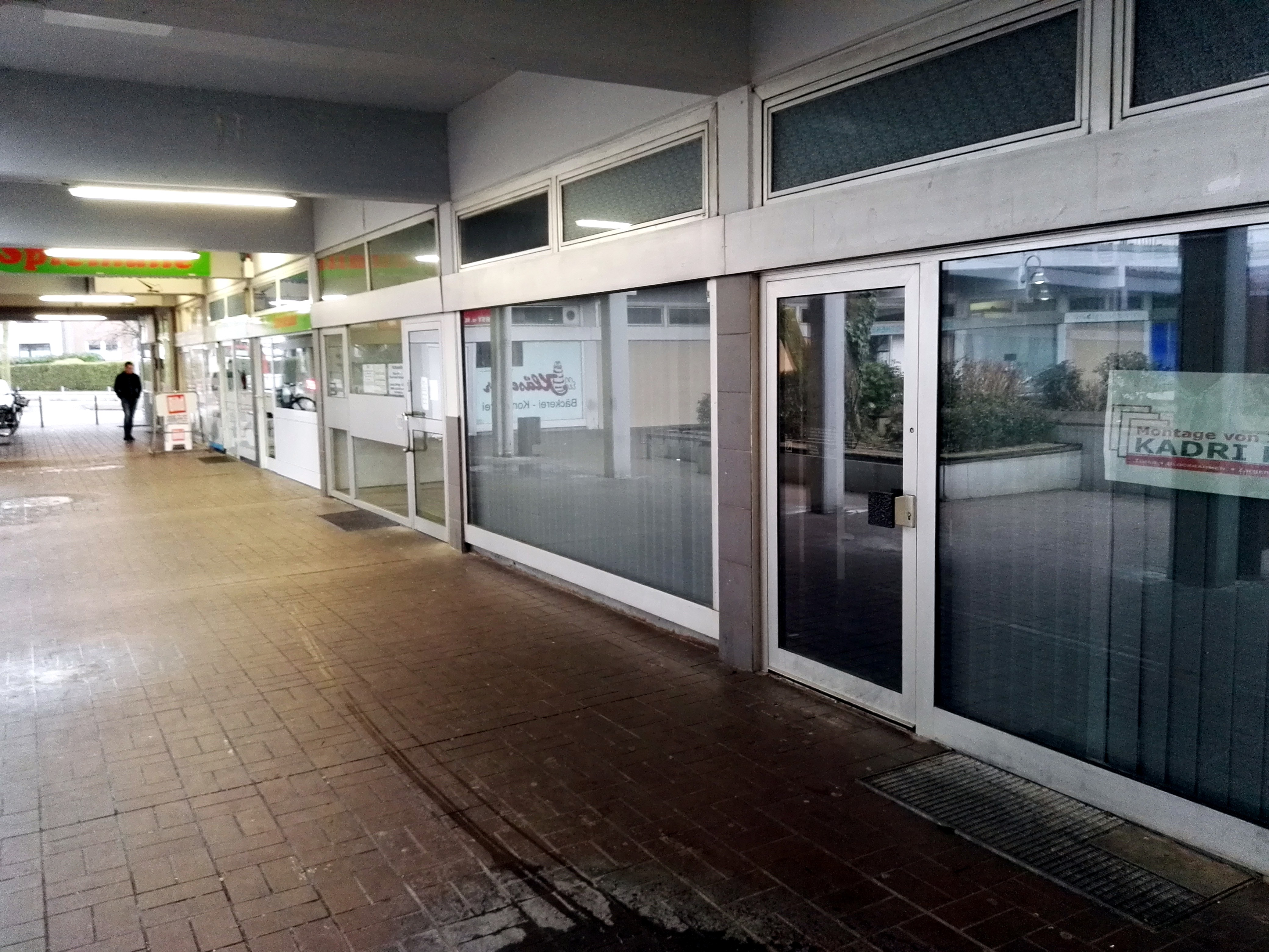 Eingang der ehemaligen Deutschen Bank, Schwechater Straße 38, Gladbeck